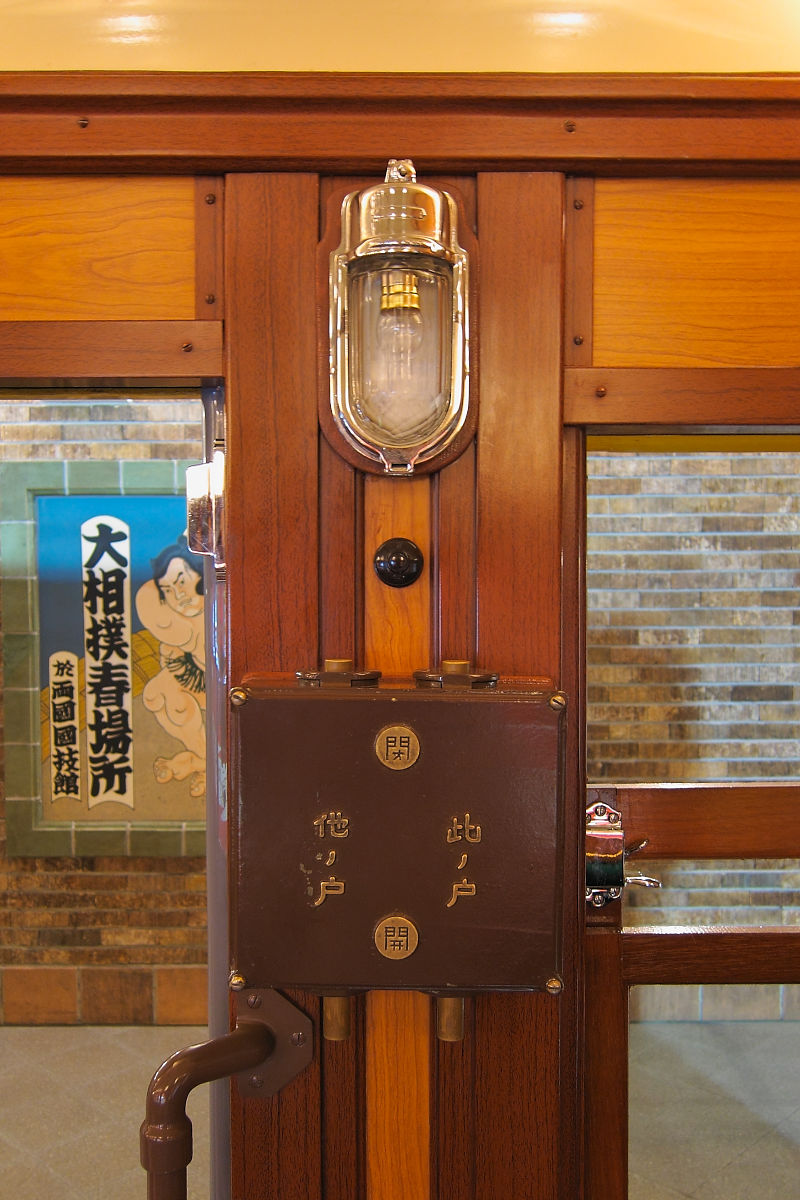 東京地下鉄道1000形の扉開閉スイッチと非常灯。地下鉄博物館の保存車。